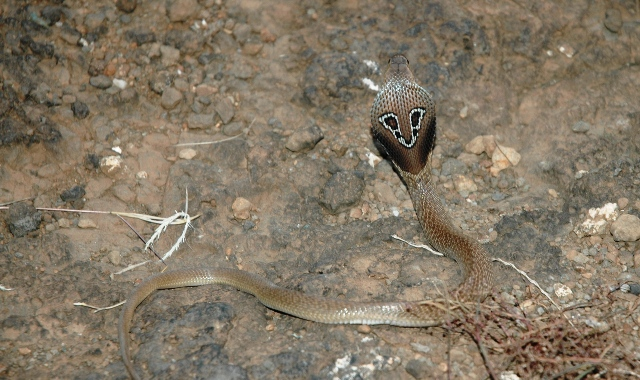 Juvenile Cobra